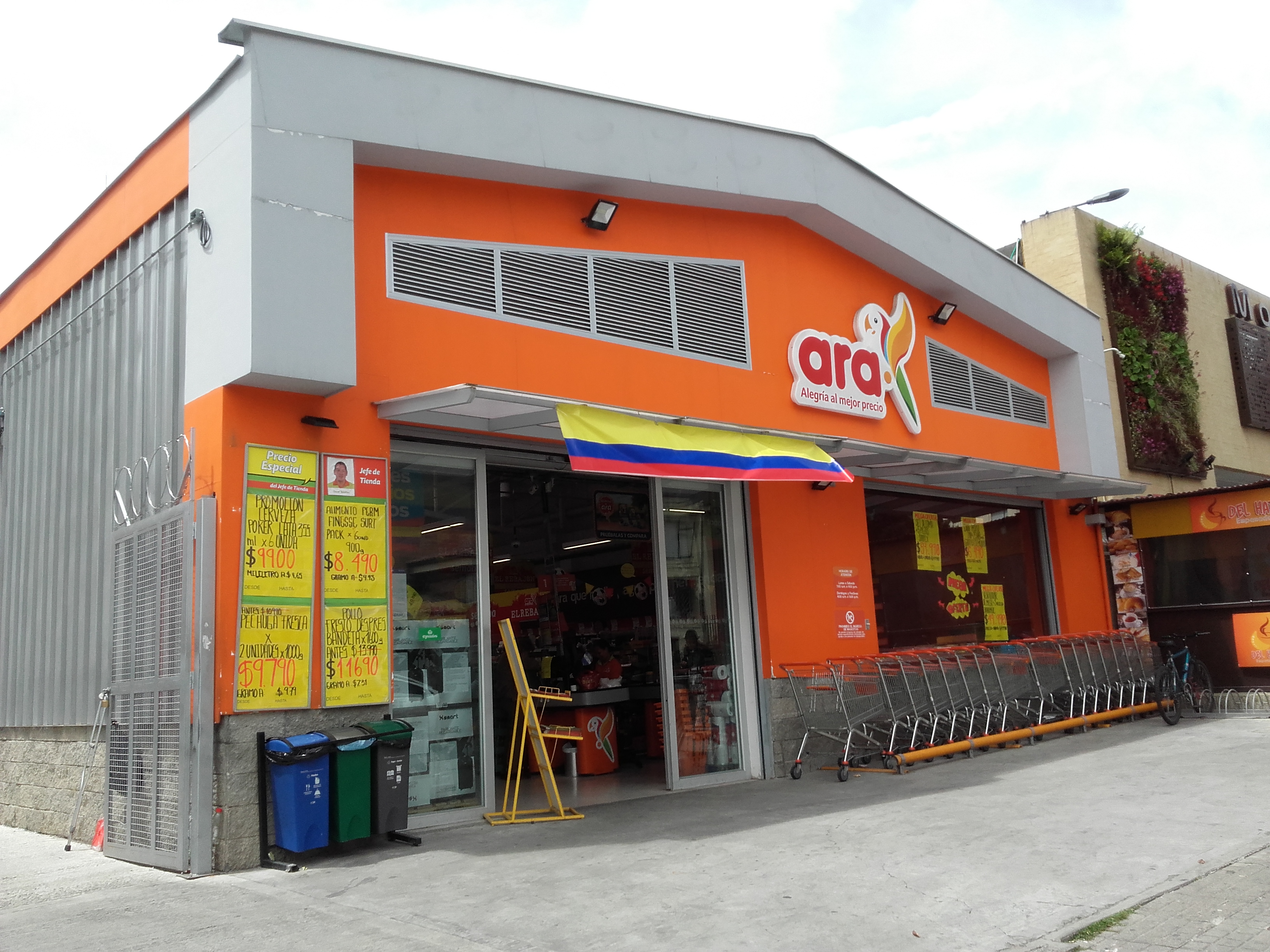 nfndndndnd